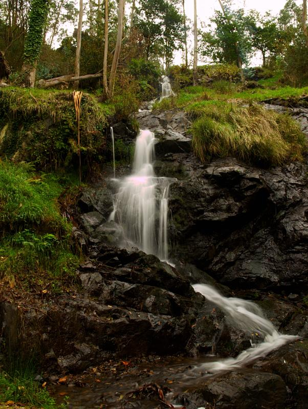 Fervenza de Rus, Carballo, Galiza